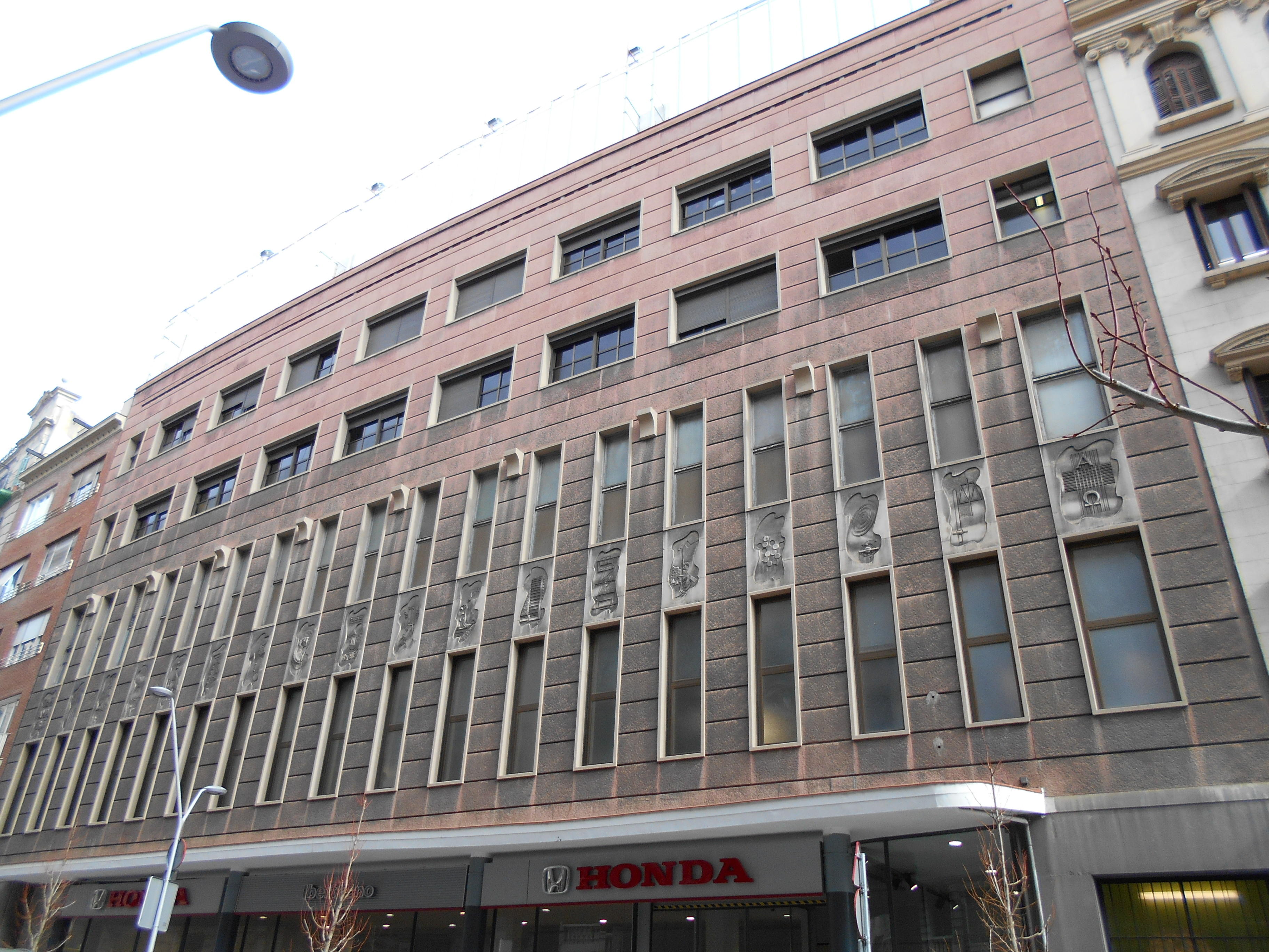 Relieves del edificio Finanzauto (1954), de Antoni Tàpies, calles Balmes 216, Barcelona.